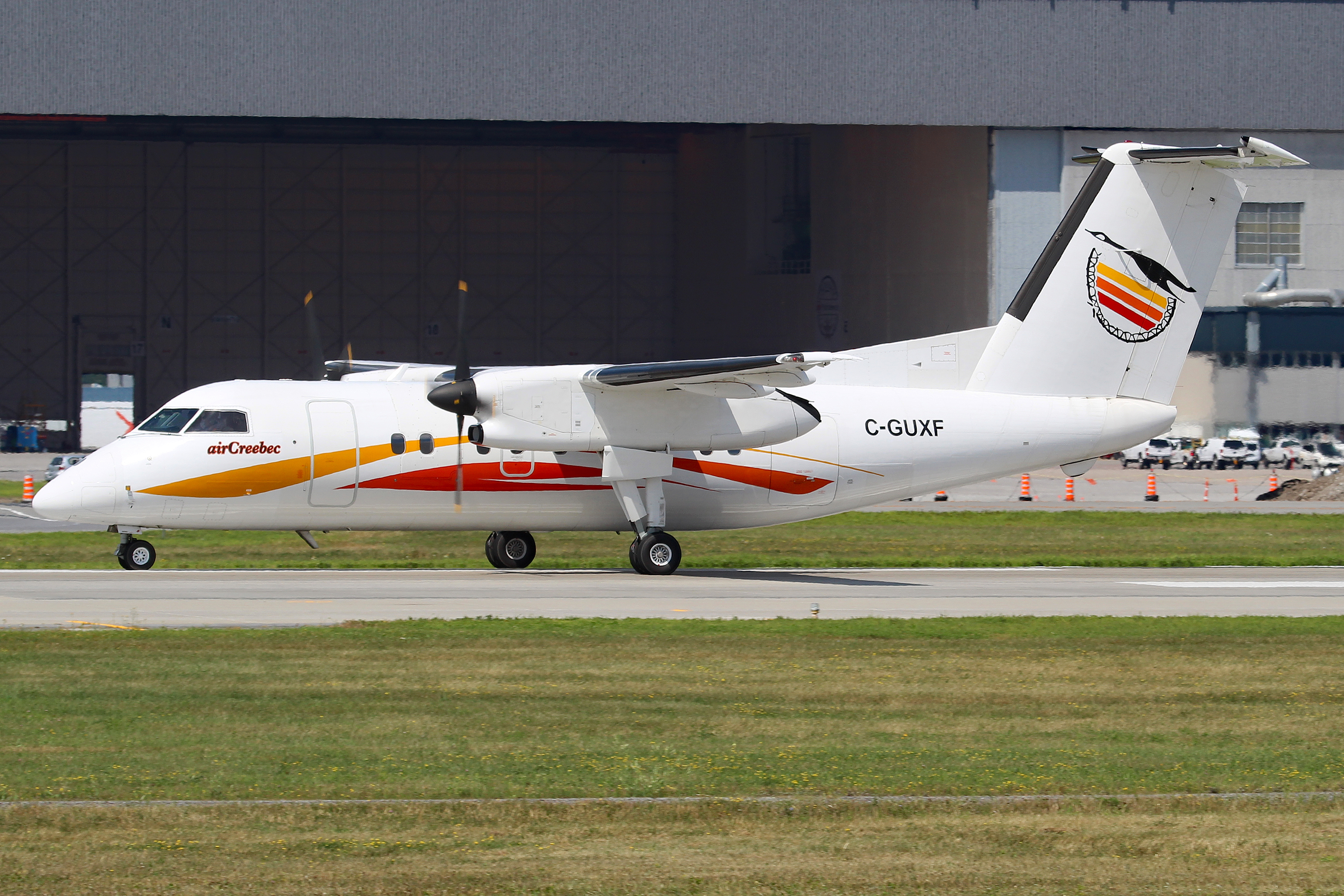 Bombardier Dash 8 Q100 der Air Creebec